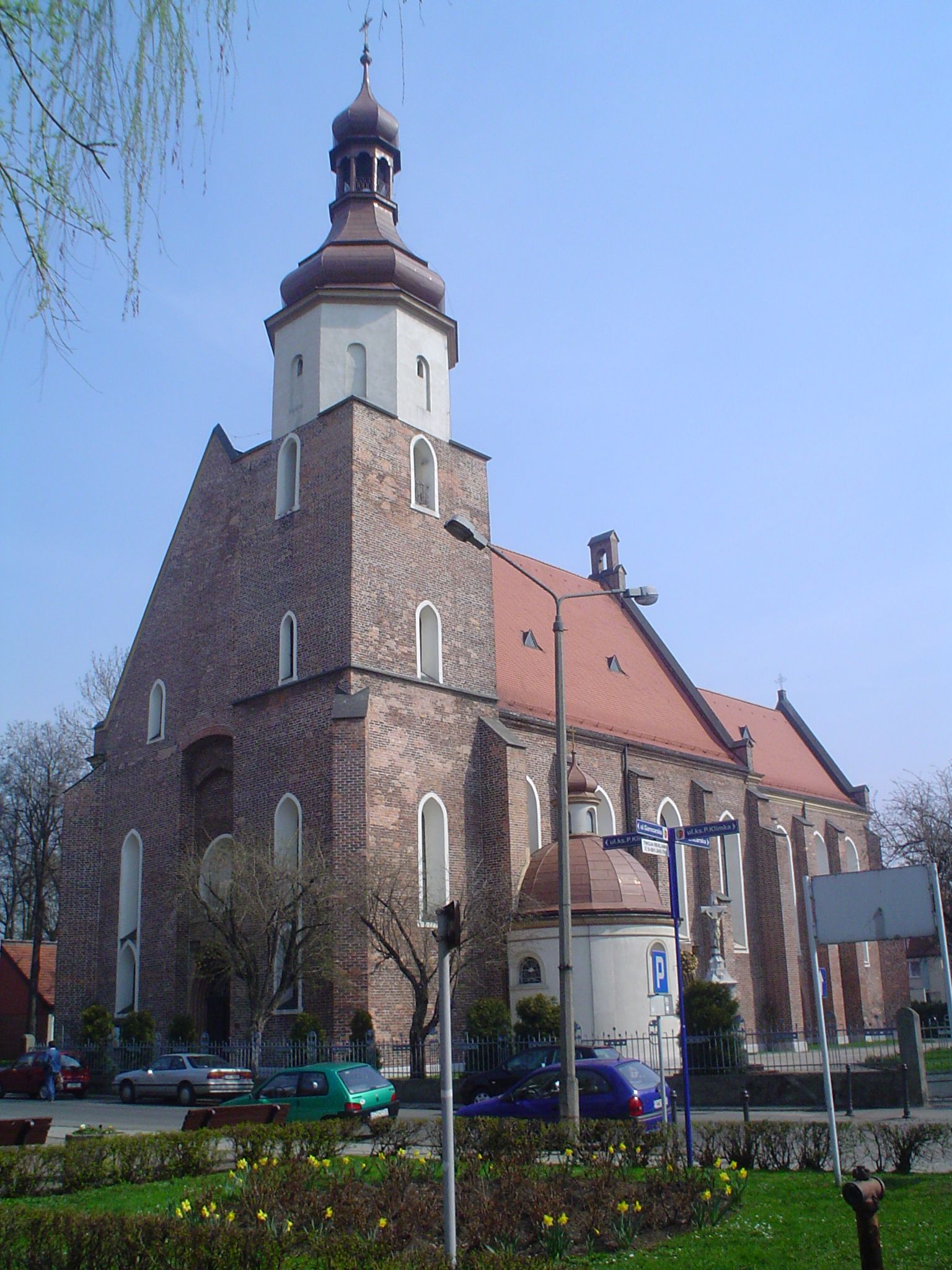 Kościół pw. Świetych Filipa i Jakuba w Żorach